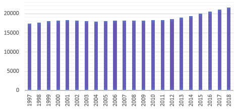 Excel-Dateien (pd): Datenquellen: 1997-2007: 2008-2017: 2010: 2011: 2012: 2013: 2014: 2015: 2016: 2017: 2018